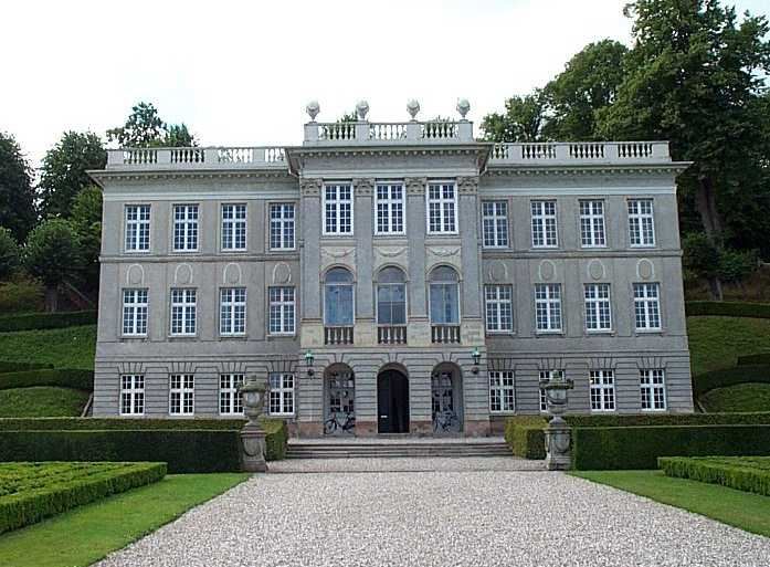 Schloss Marienlyst, Helsingør, Dänemark